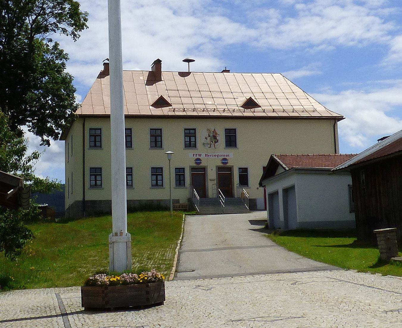 Herzogsreut)